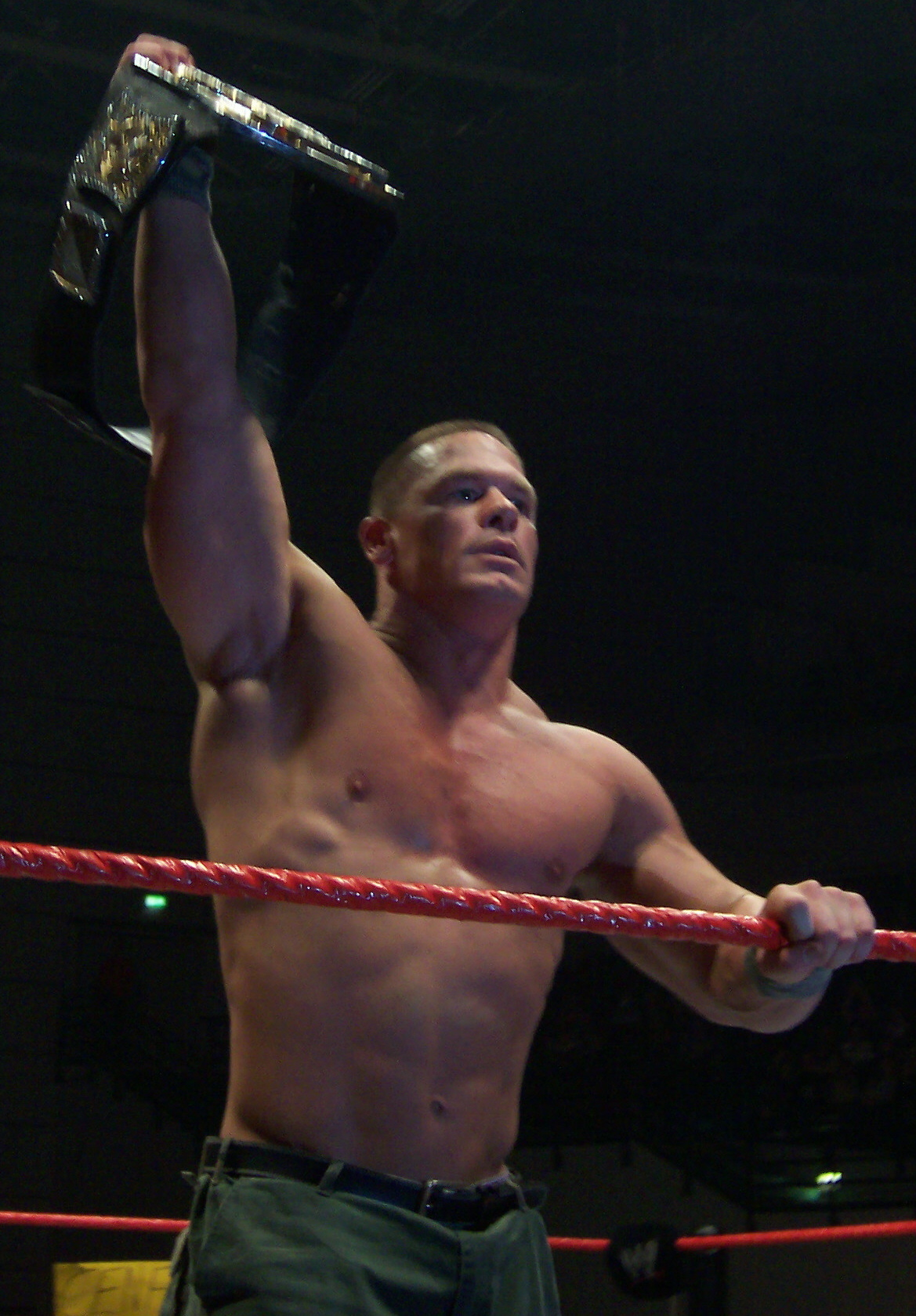 John Cena 2007 in Bremen